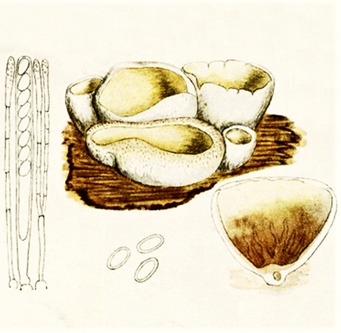 Bres.: Aleuria vesiculosa (Pierre Bulliard, 1790) Gillet (1879), heute Peziza vesiculosa Pierre Bulliard (1790)